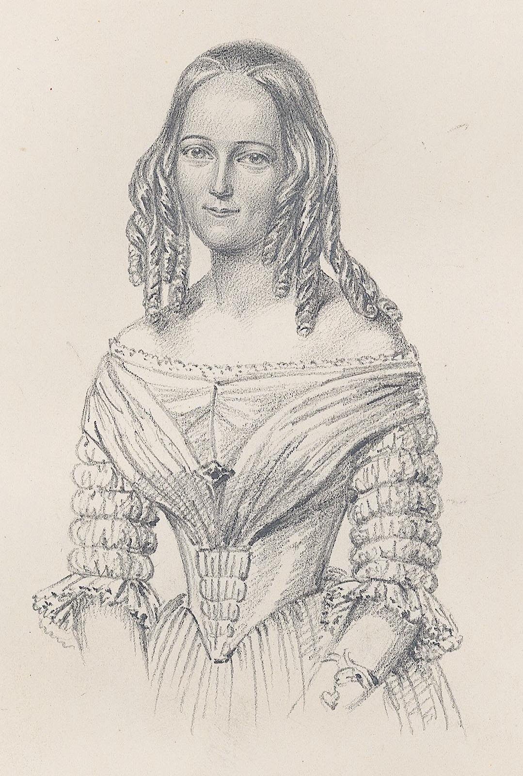 Charlotta Almlöf (1813-1881)